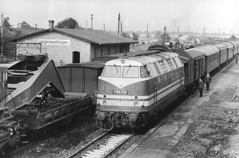 Zentralbild Koard bgm-ne 7.7.1967 Bezirk Magdeburg: Unglücksstelle bei Langenweddingen wieder passierbar 24 Stunden nach dem tragischen Verkehrsunfall passierte am Morgen des 7.7.1967 ein D-Zug von Halberstadt nach Berlin wieder die Unglücksstelle am Bahnhof Langenweddingen. Das gewährleisteten Eisenbahner und andere Helfer mit ihrem unermüdlichen Einsatz.